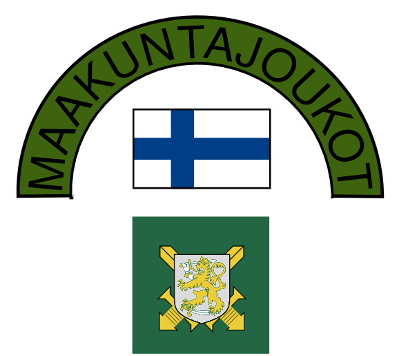 Pääesikunnan vahvistama maakuntajoukkojen hihatunnus. Versio piirretty lähteenä olleen asiakirjan pohjalta itse käyttäen Inkscapea, sillä alkuperäisessä kuvaa on pakattu rajusti.